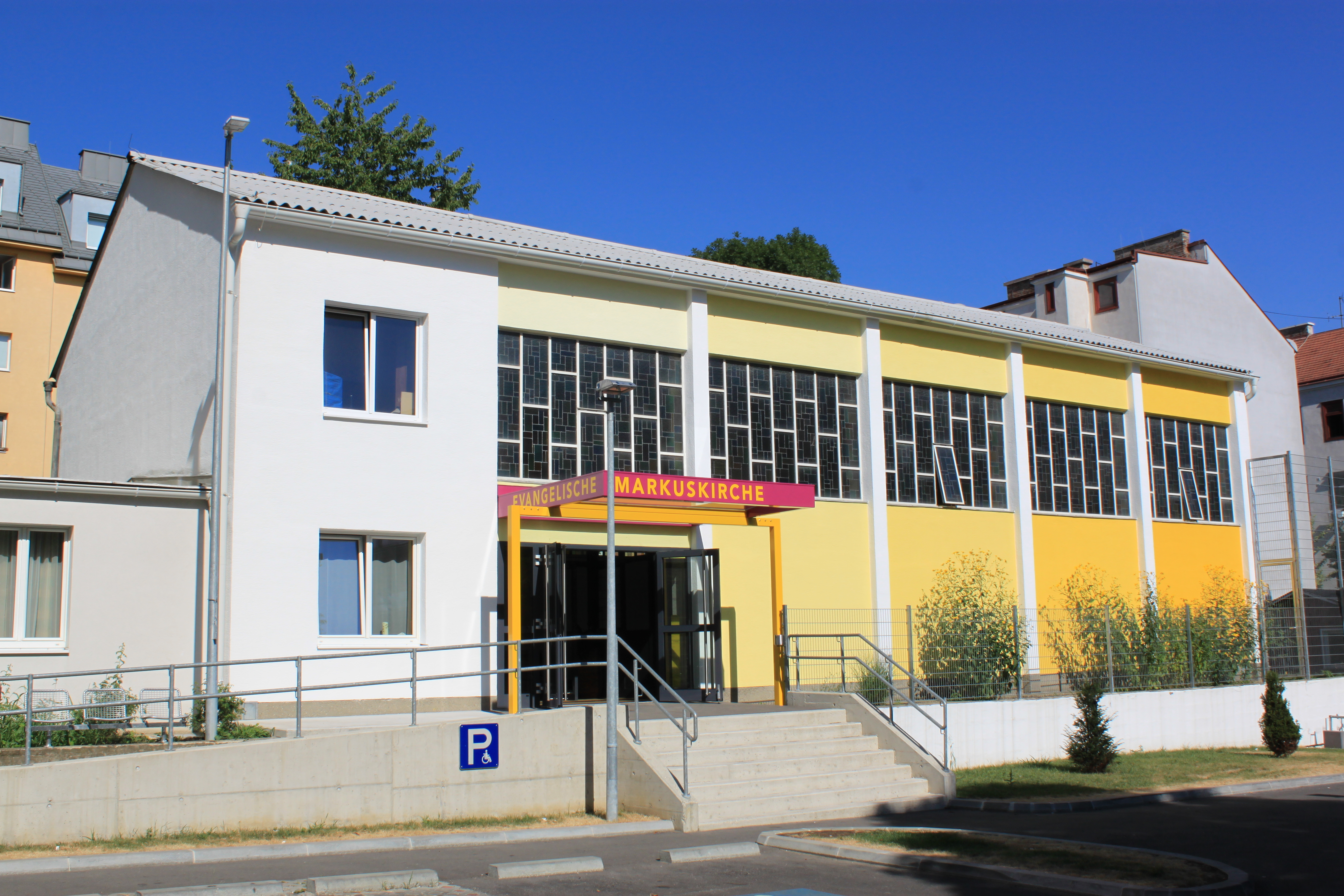 Die evangelische Markuskirche in Wien-Ottakring.